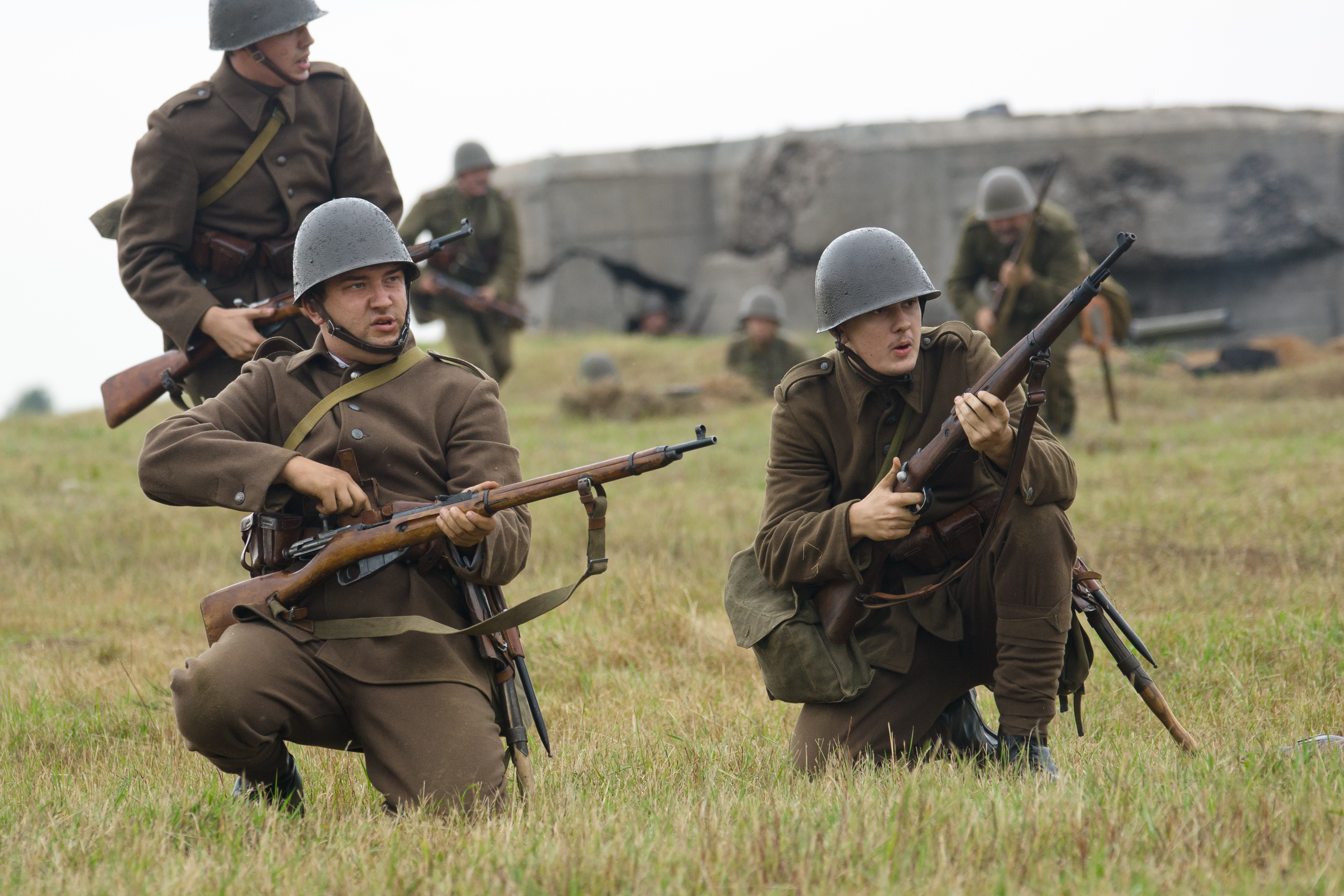 V rekonstrukcja Bitwy pod Mławą, 1. września 2012.